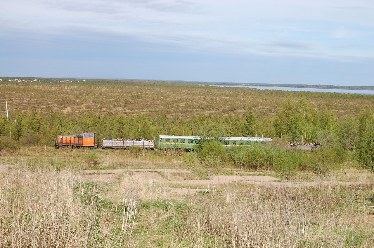 Кудемская УЖД